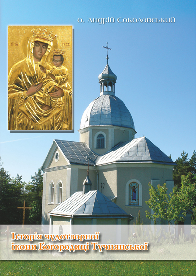 Книга о. Андрія Соколовського „Історія чудотворної ікони Богородиці Тучнянської”